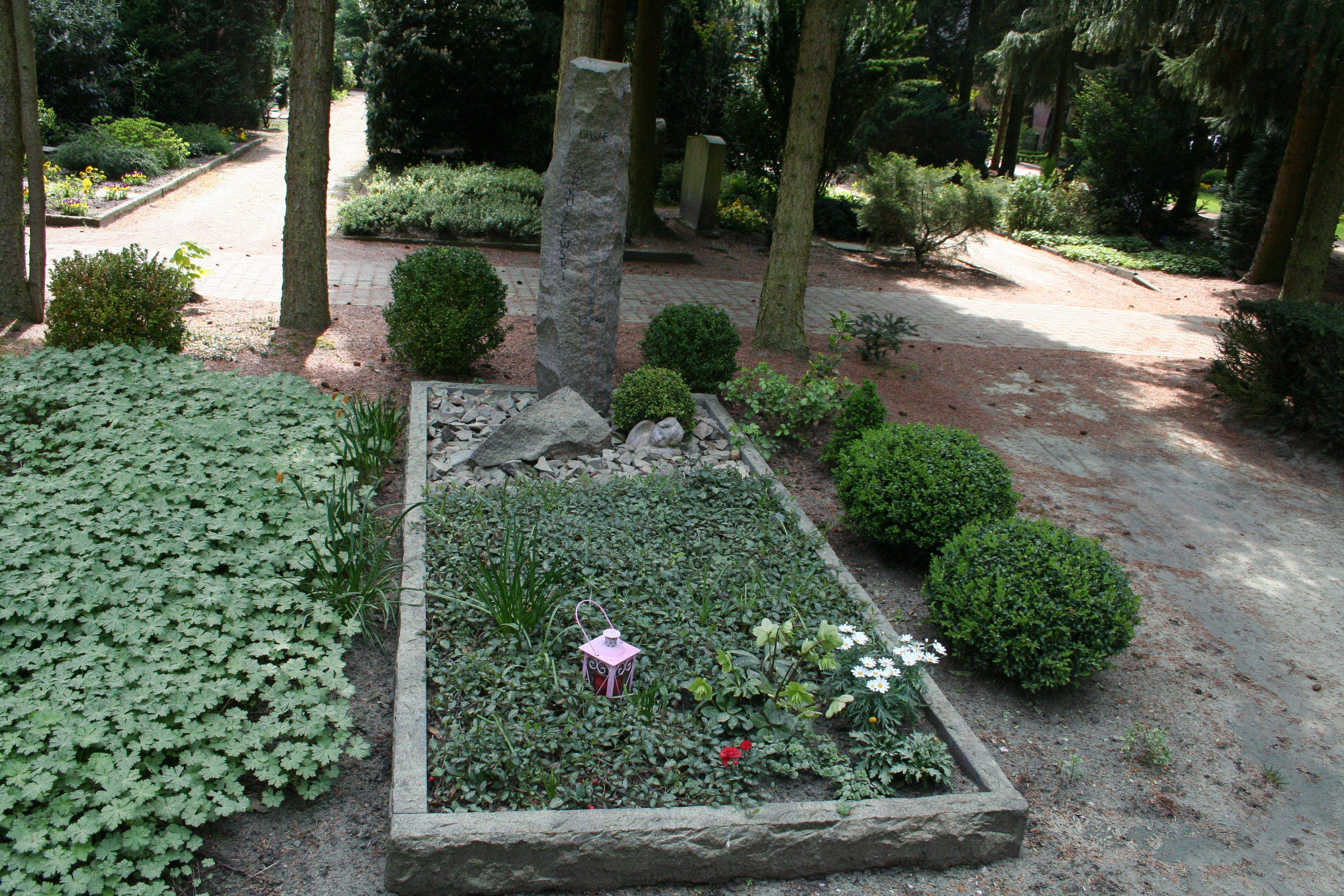 Grab von Rundfunkmoderator Uwe Arkuszewski auf dem Garstedter Friedhof in Norderstedt bei Hamburg